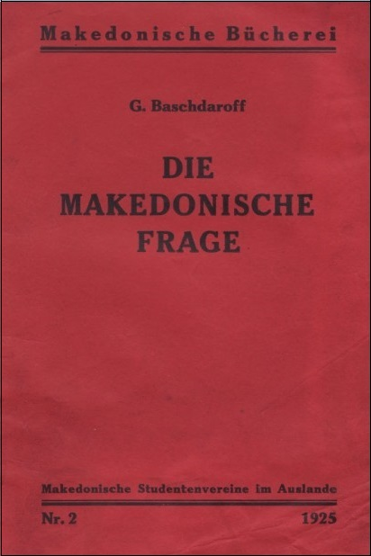 Корица на "Die Makedonische Frage" на Георги Баждаров.